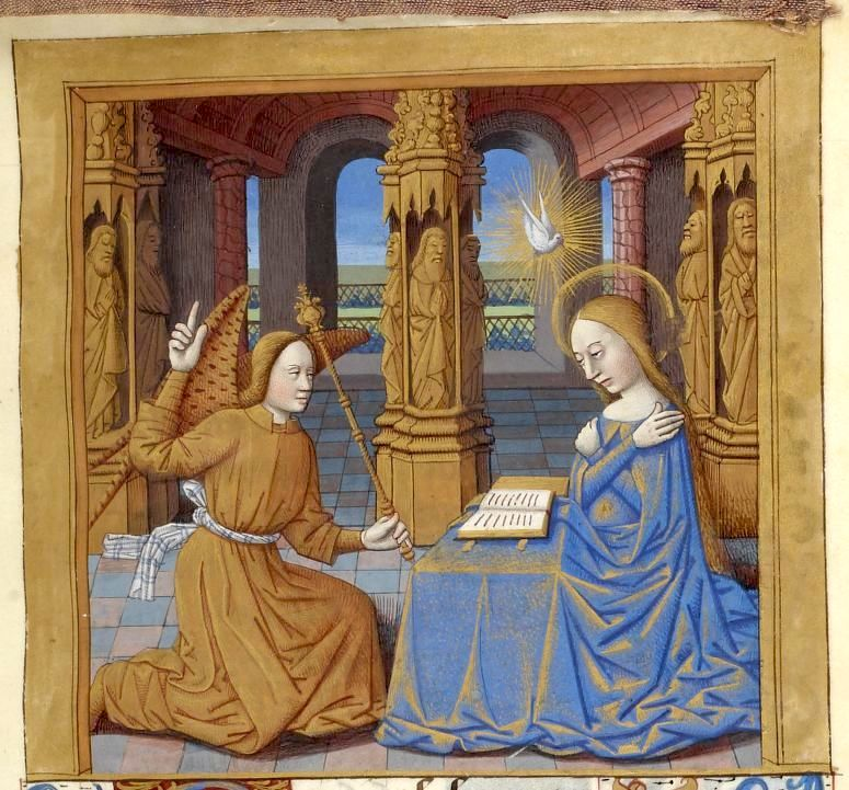 Heures à l'usage de Tours (BnF Ms Lat. 1202 024r) Annonciation (miniature)